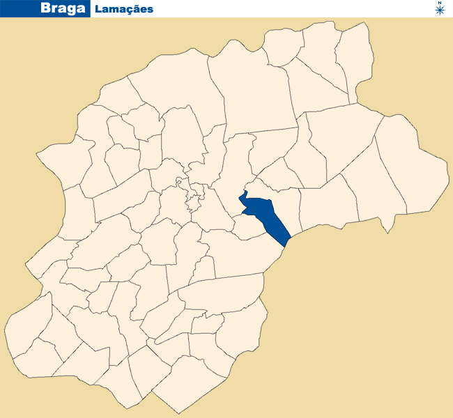 Localização de Lamaçães no concelho de Braga.